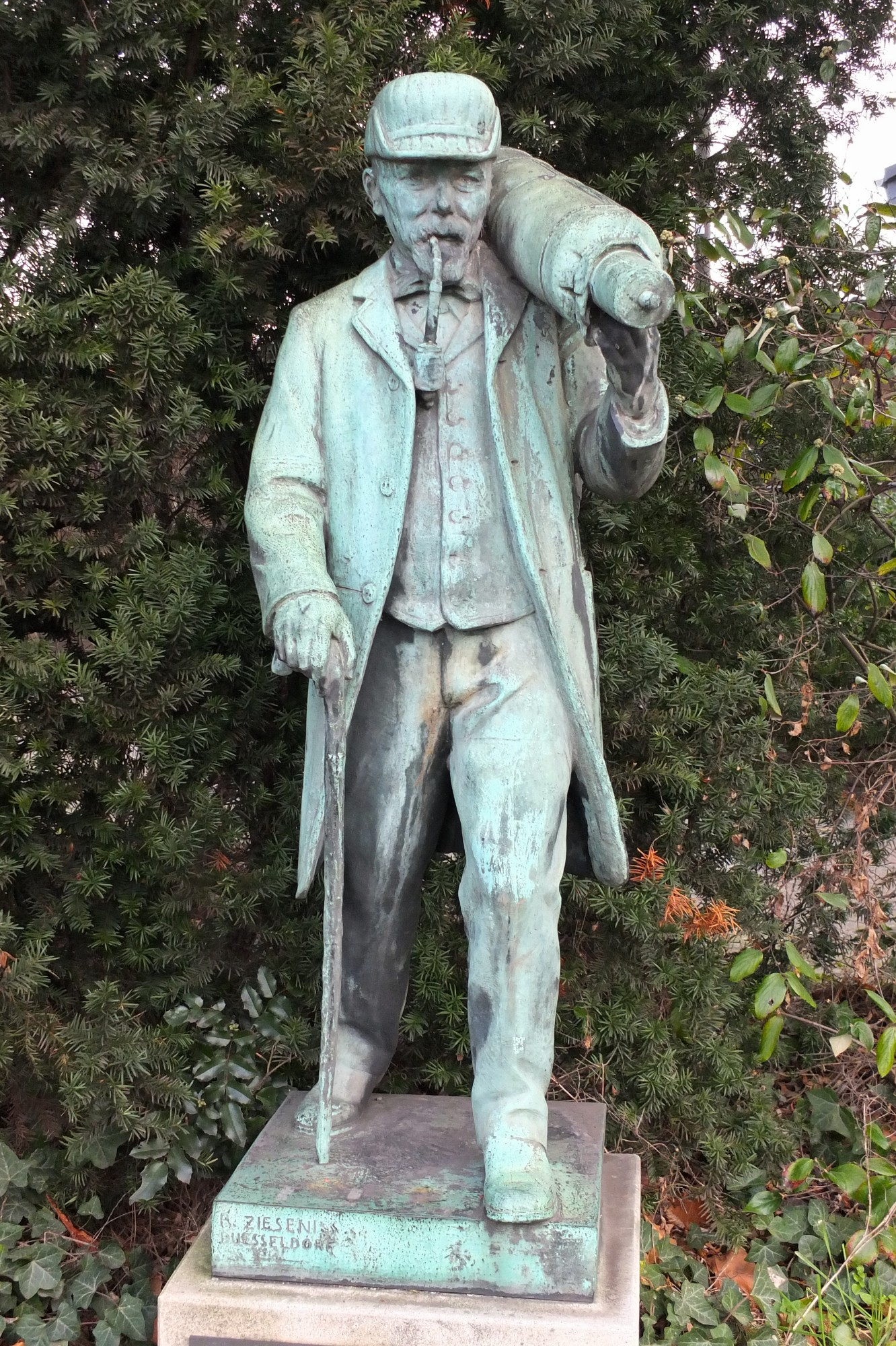 Carl Hasbach, der letzte Handweber, Plastik von Rudolf Zieseniss, Hilden, Hochdahler Straße Ecke Berliner Straße